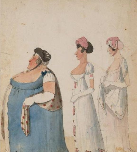 Графиня Наталья Львовна Соллогуб (урождённая Нарышкина), ее сестра графиня Екатерина Львовна Головкина (урождённая Нарышкина) и племянница княгиня Наталья Юрьевна Салтыкова.